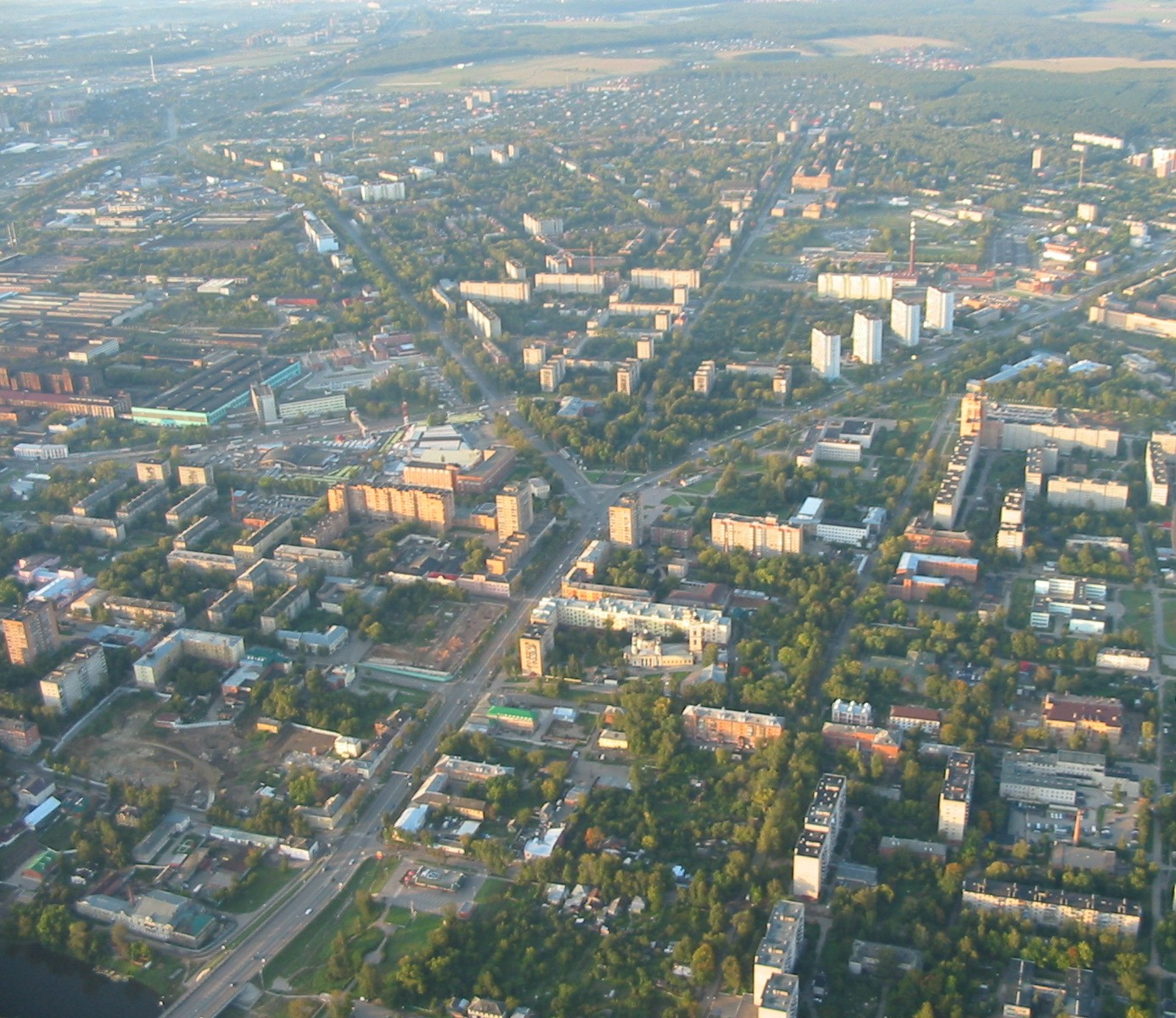 Центр Подольска с птичьего полётаснимок сделан с дельталёта, высота 500 м.